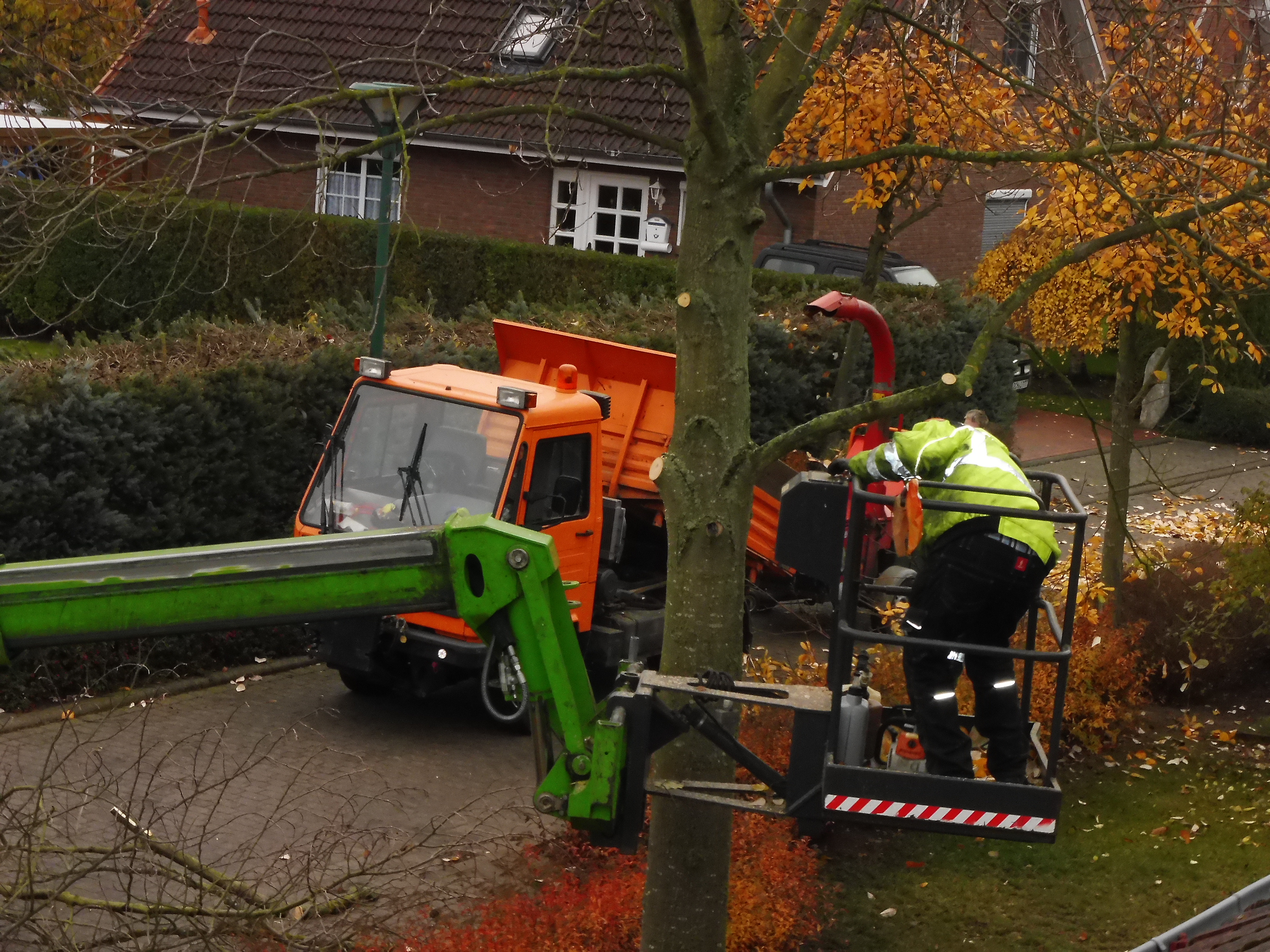 Mitarbeiter des Bauhofs Plau am See beim herbstlichen Ausasten von Laubbäumen in einer Wohnsiedlung